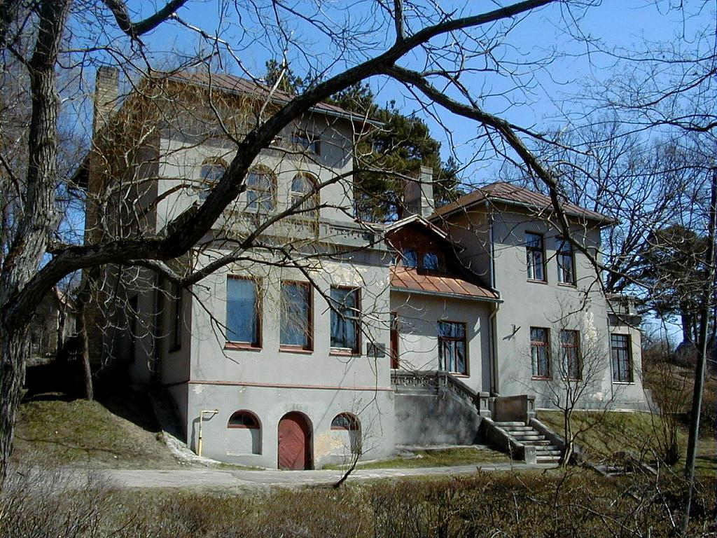 Ikšķile, gleznotāja J. Kugas māja 2003-04-26